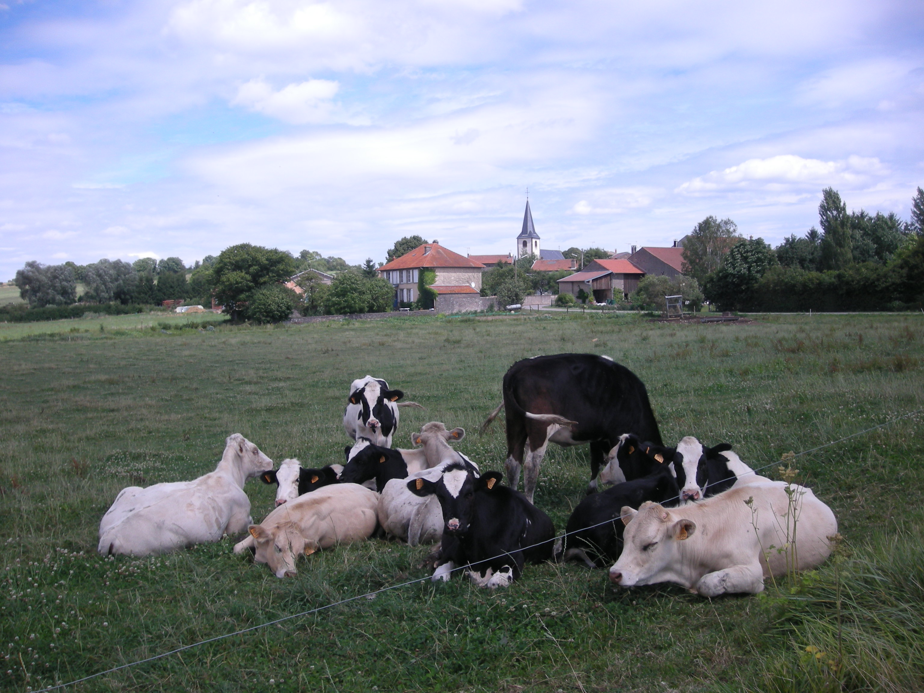 Le village de Gélacourt (Meurthe-et-Moselle), son église et ses pâturages